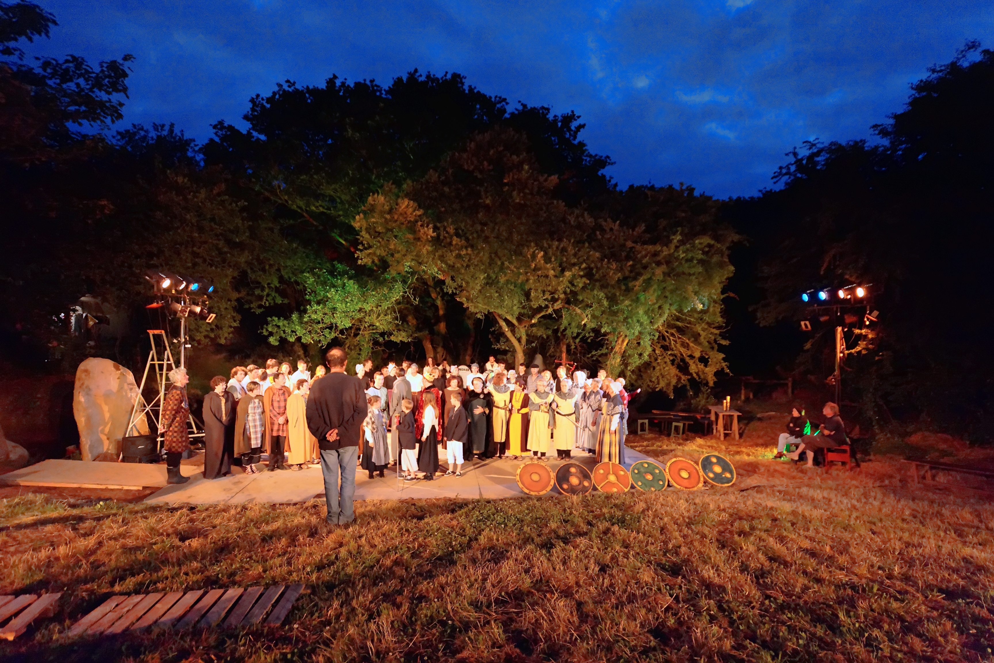 Répétition de la troupe Ar vro Bagan à Saint-Gildas (Côtes-d'Armor, France).